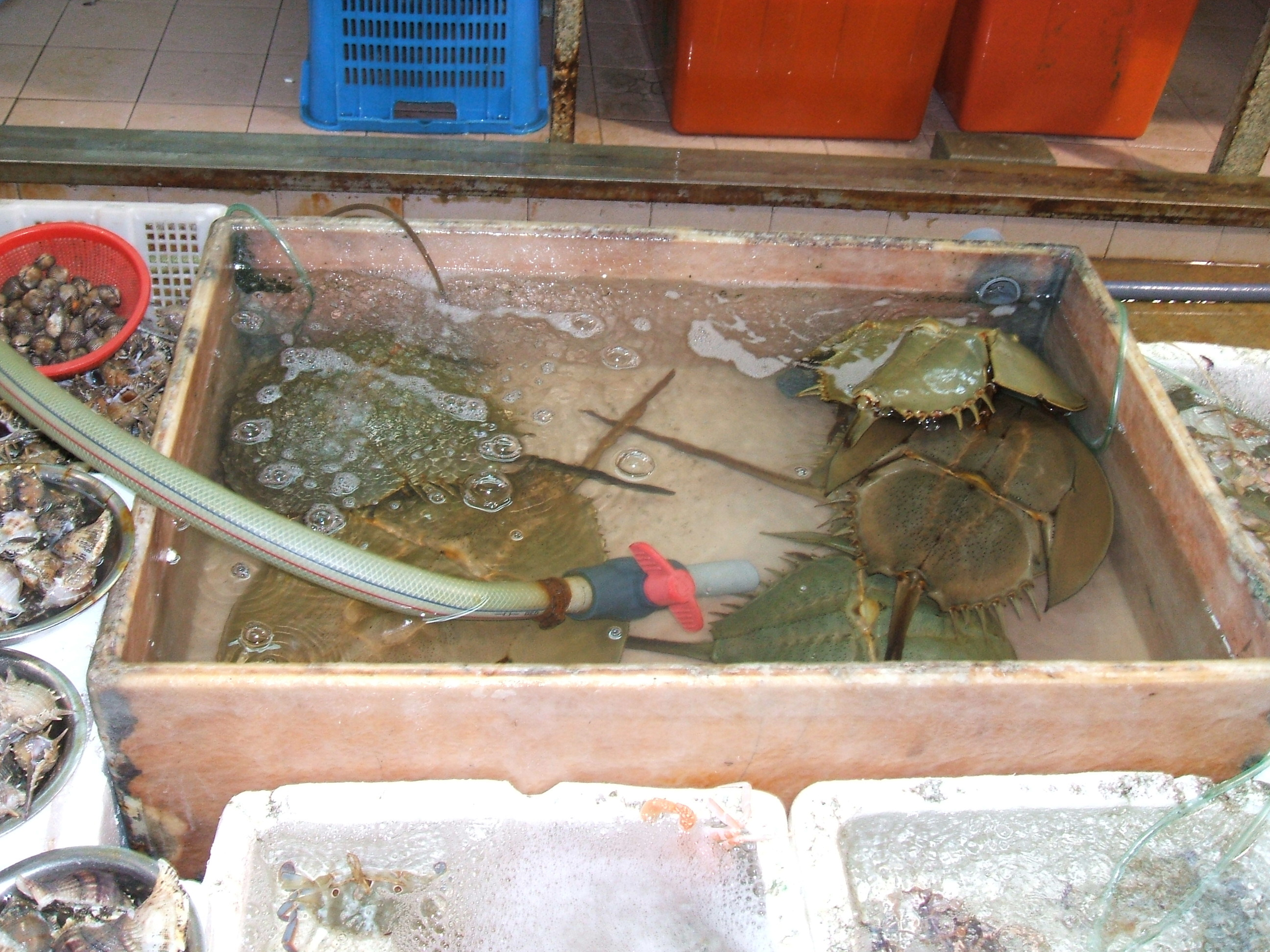 中華人民共和国香港特別行政区ノースポイントの海産物市場で販売（食用？）されていたカブトガニ（Tachypleus tridentatu）の映像